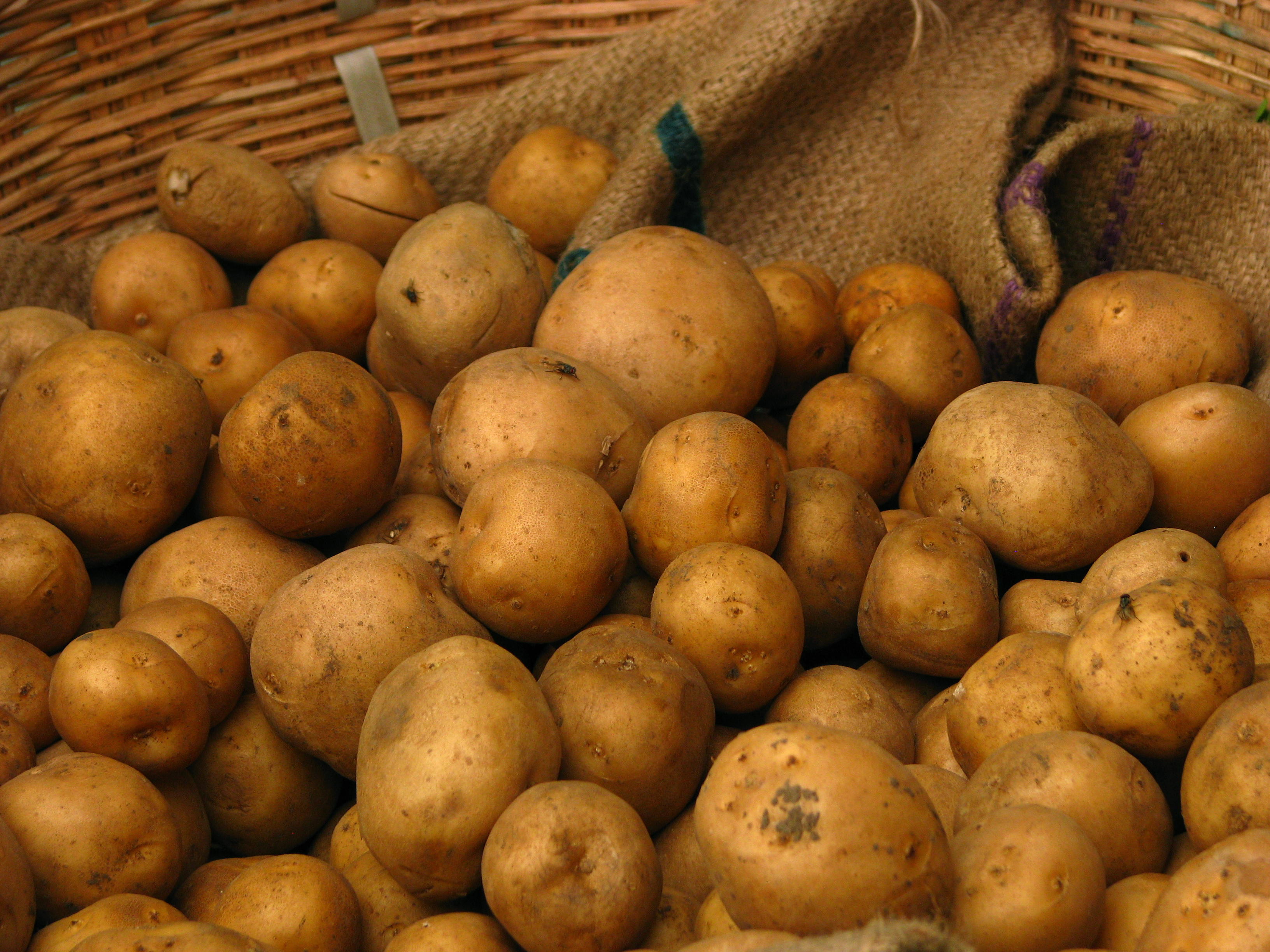 India - Koyambedu Market - Potatoes 01